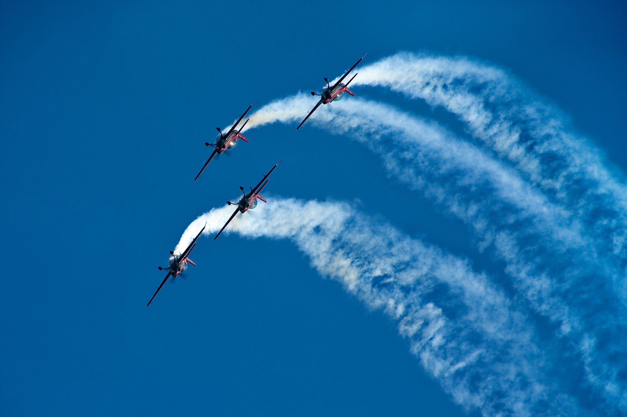 Kunstflugvorführung der Royal Jordanian Falcons mit Extra 300 Maschinen.